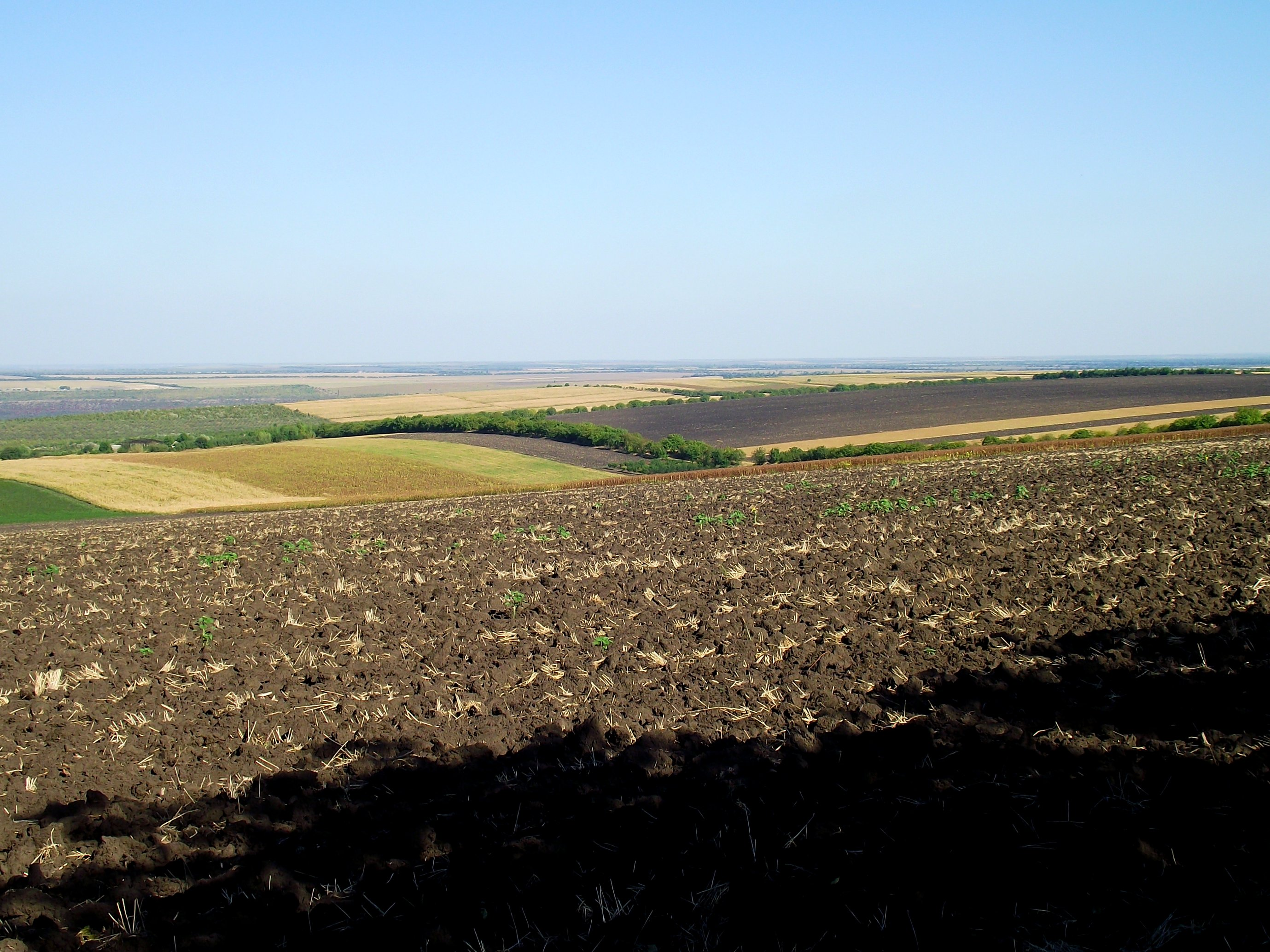 Unnamed Road, Izvoare, Moldova